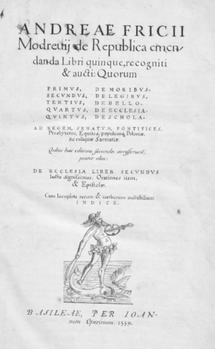 Frycza Modrzewskiego De Republica Emendanda 1559